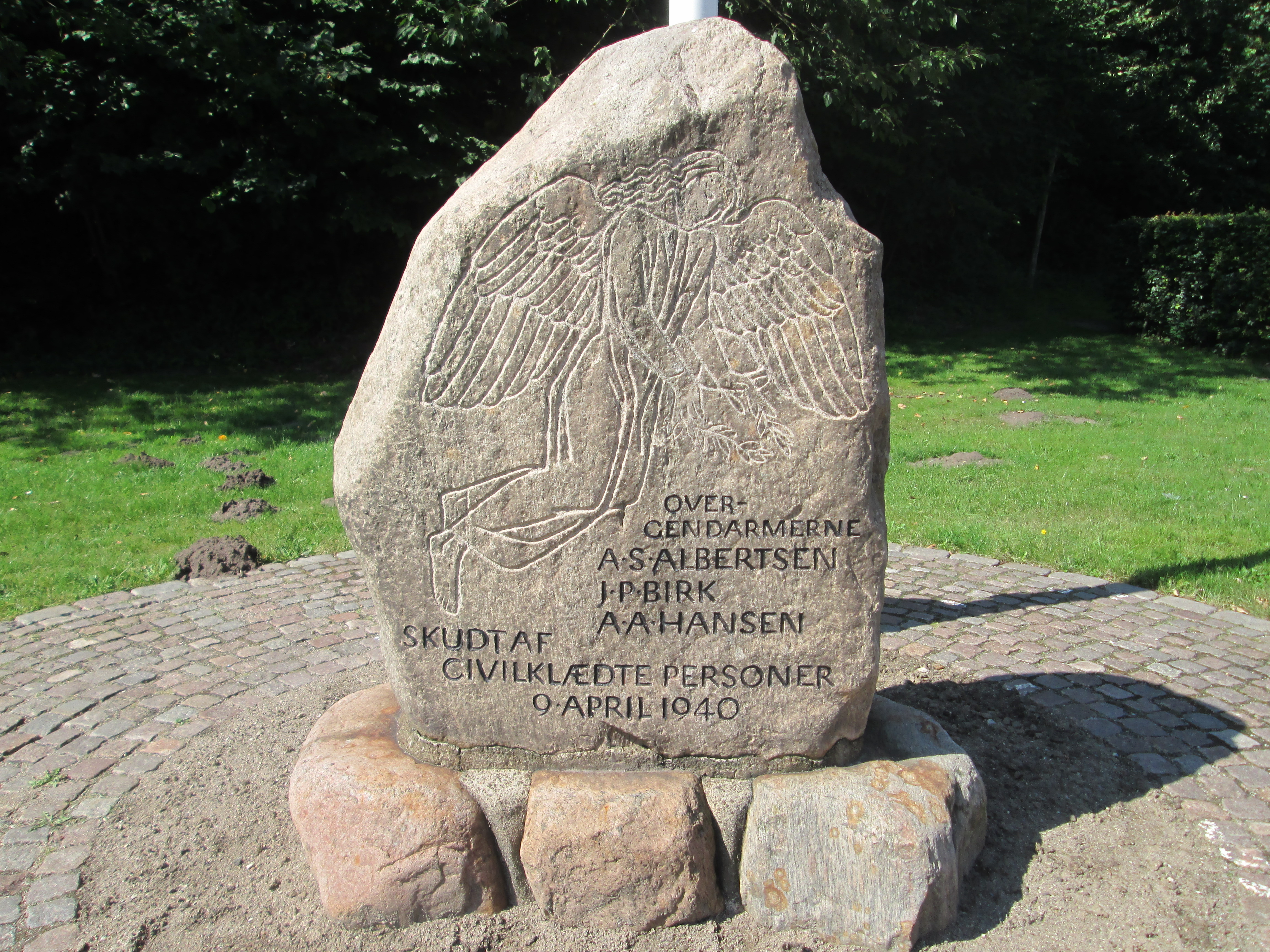 Mindesten i Gendarmhaven i Padborg